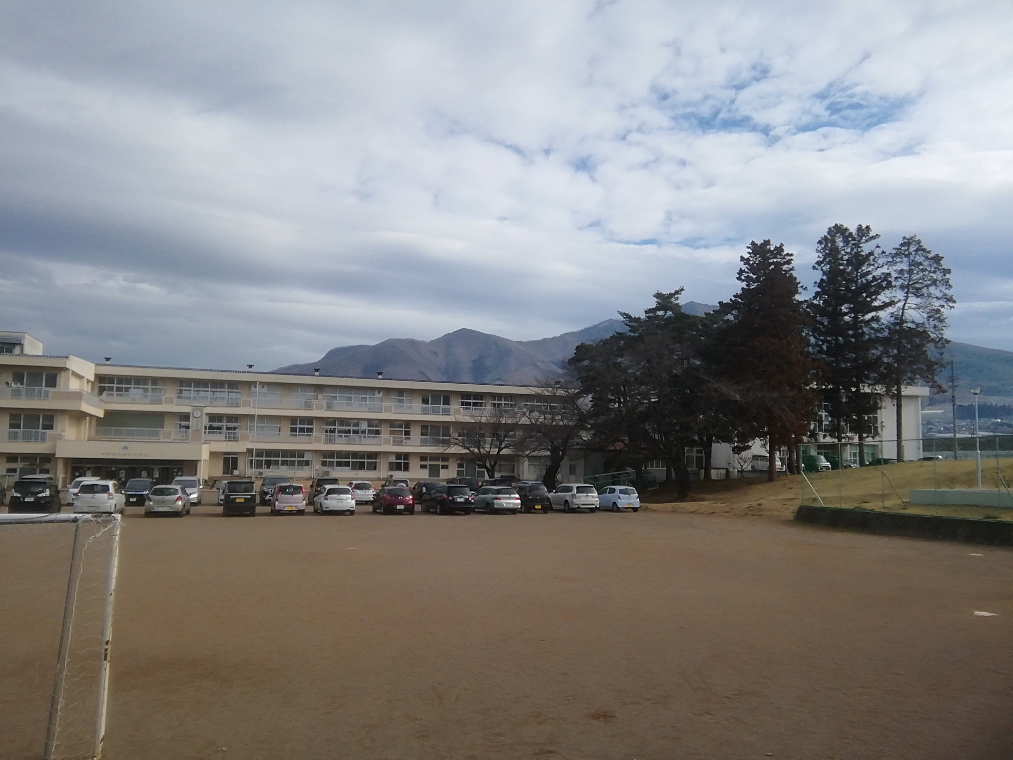 高社小学校（2020-3-27）